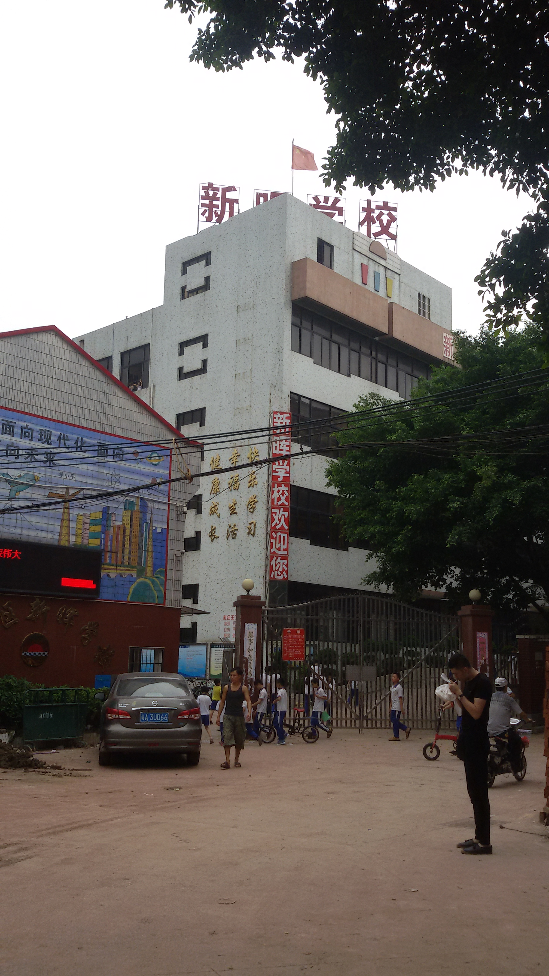 粵語: 荔湾区新晖学校